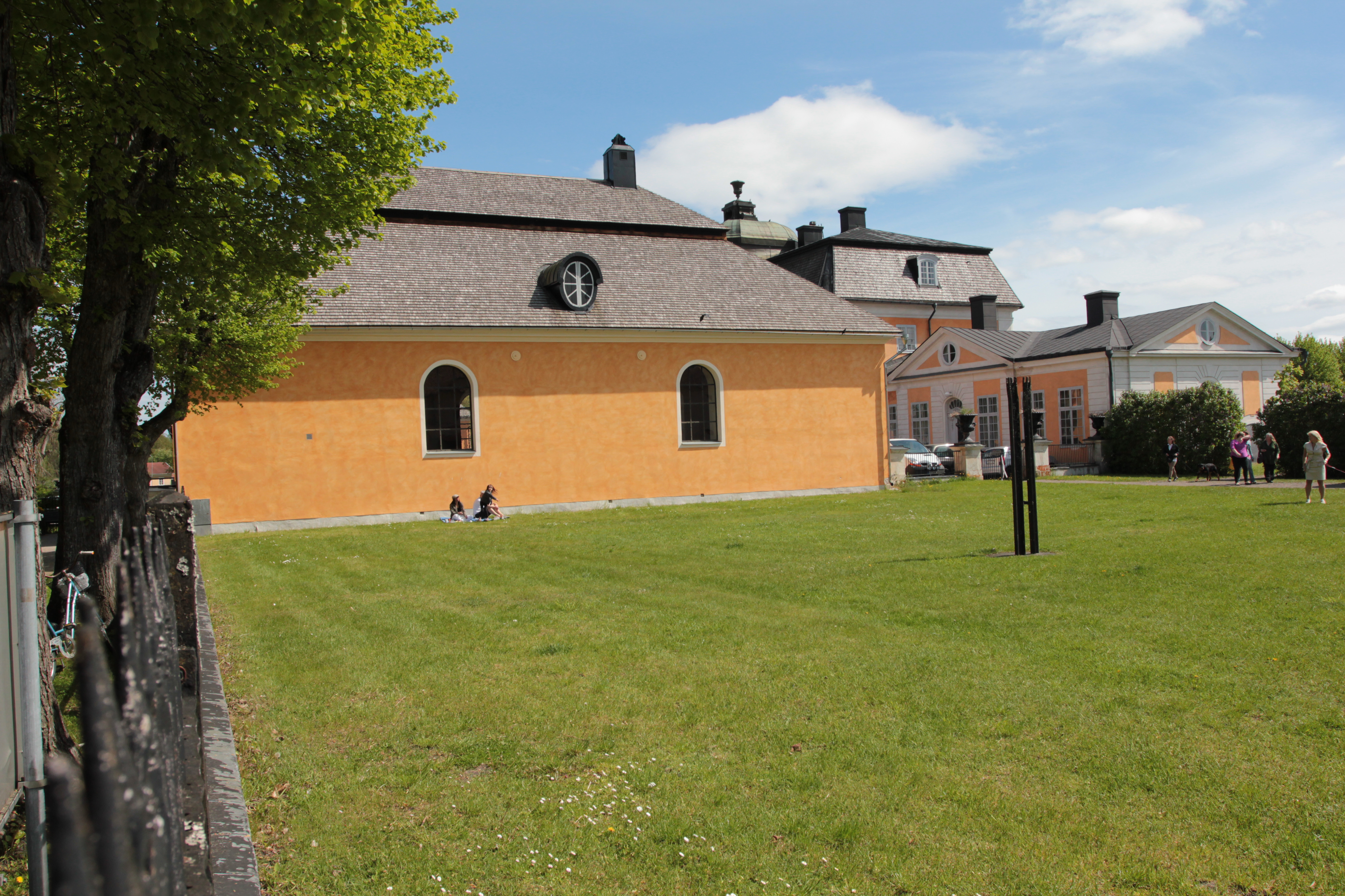 Österbybruks kyrka. Foto uppladdat som en del i Bergslagssafarin 26 maj 2012.